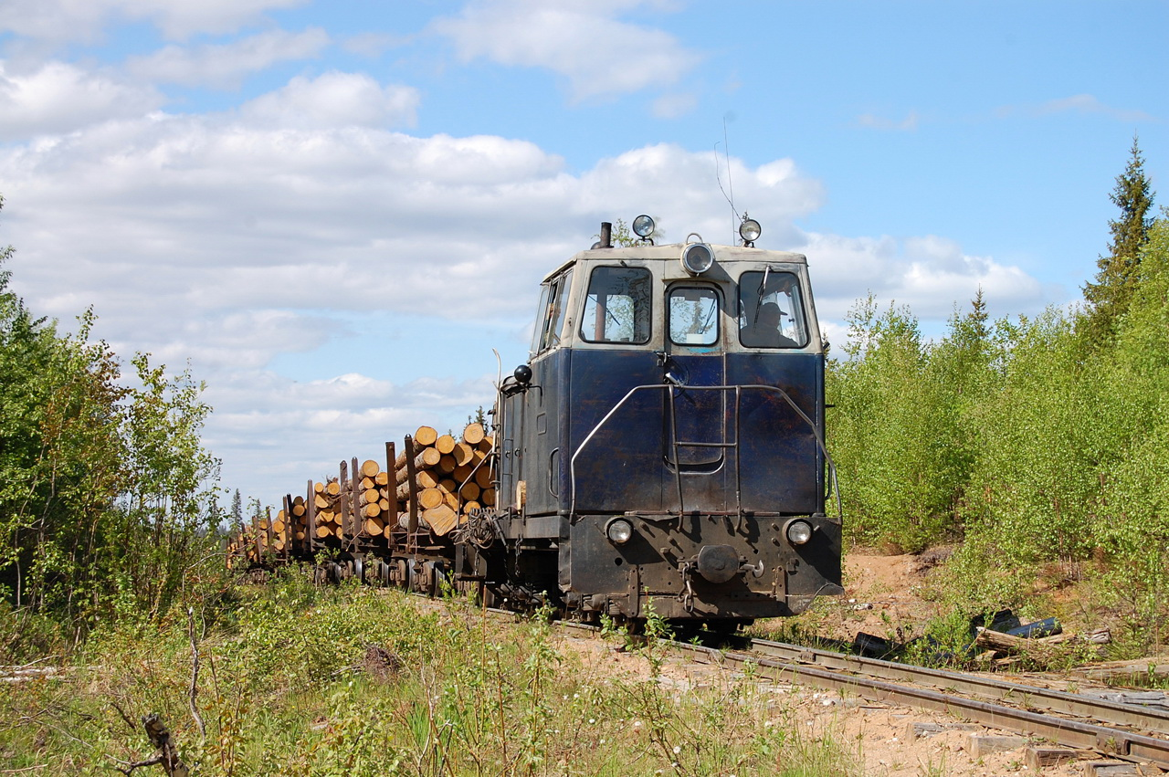 Тепловоз ТУ6А-2823(ТУ7-1710), Конецгорская УЖД